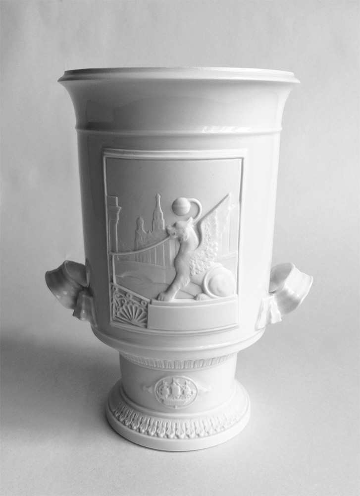 Декоративная ваза "Банковский мостик". 1977 г